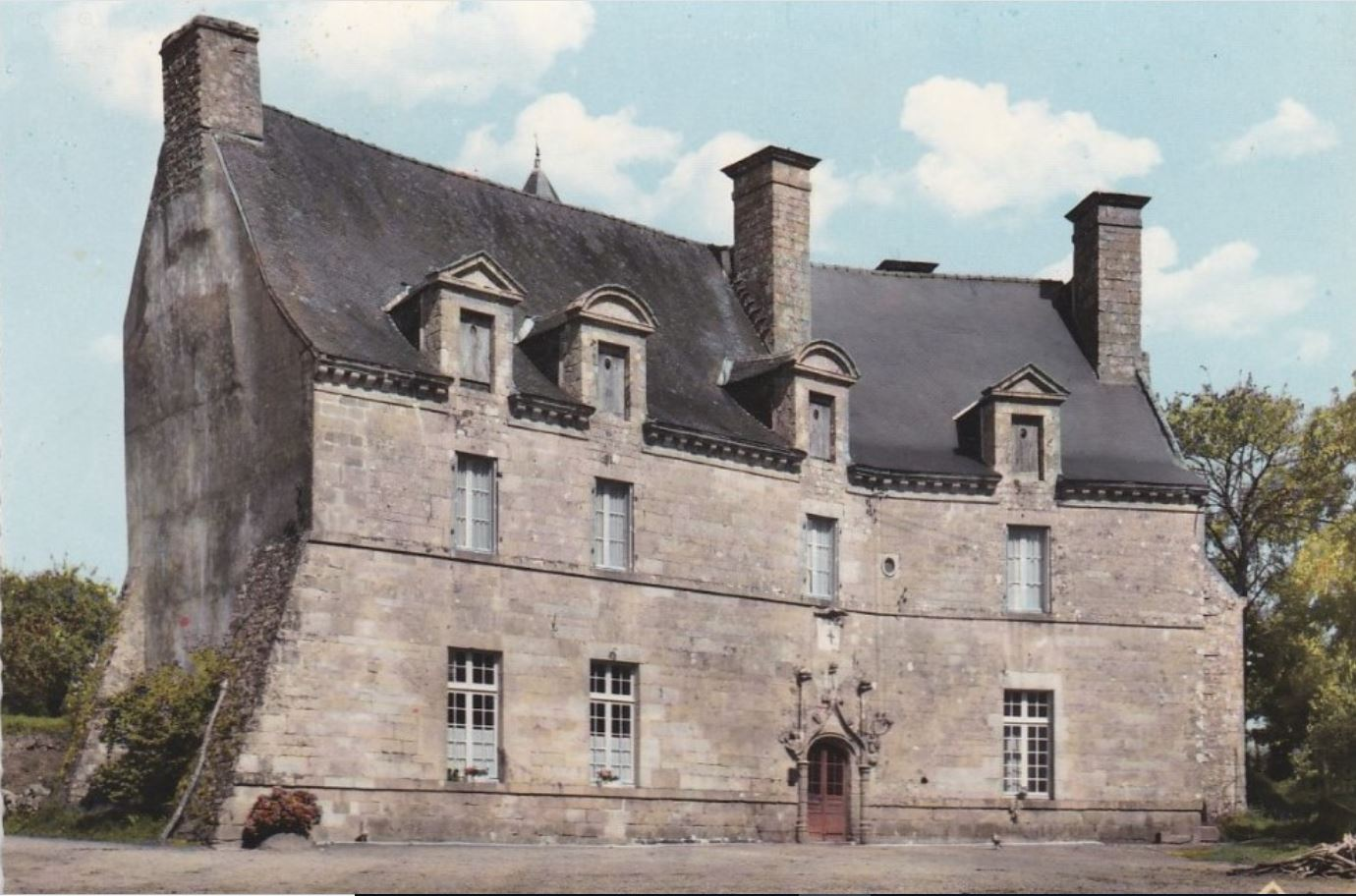 carte postale de château de Kermerien (Saint-Caradec-Trégomel) vers 1950.